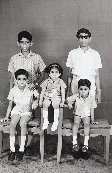 Photograph of Neranjan, Mano, Anuradha, Lankesh & Nishangani